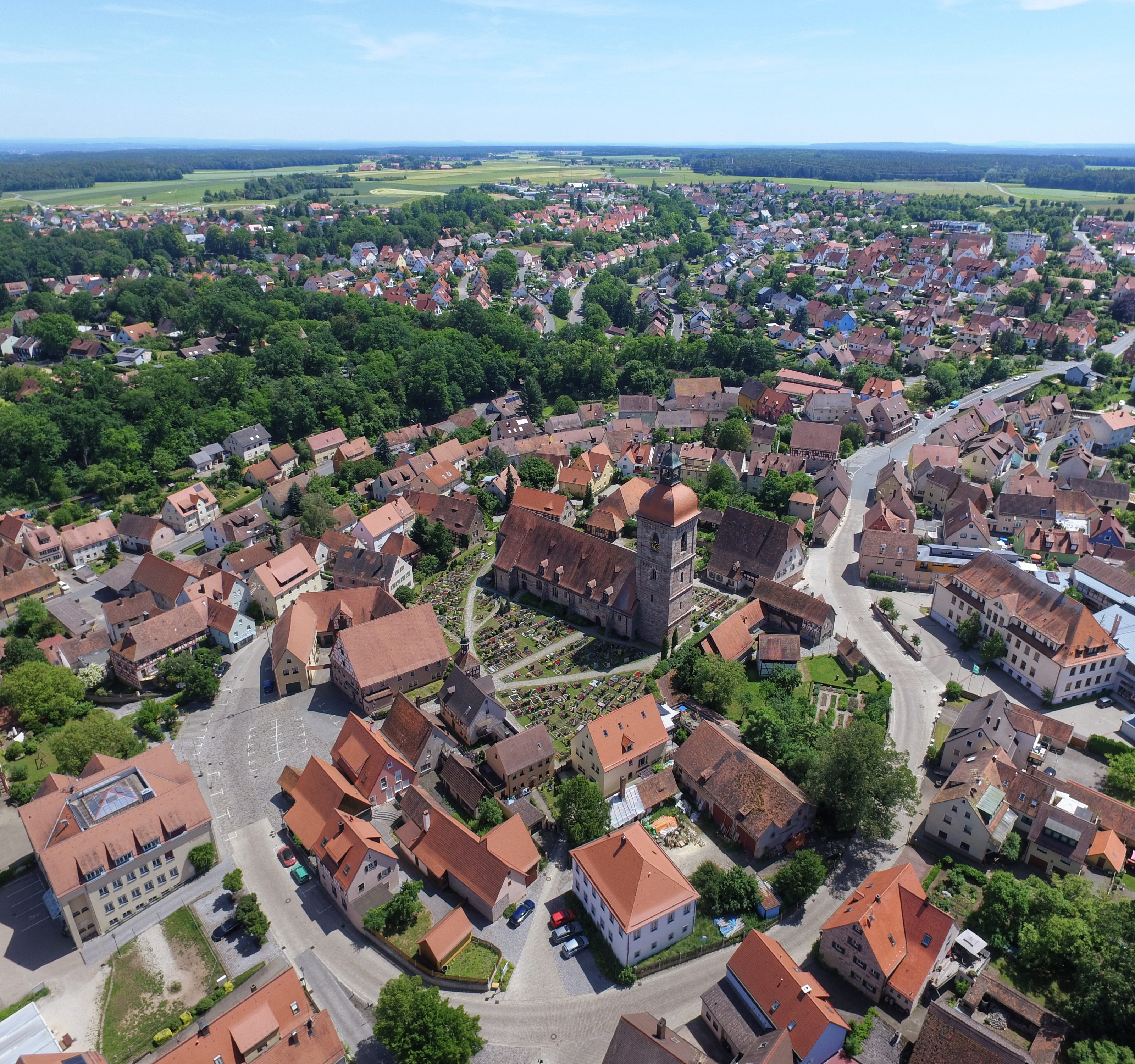 Ortskern Roßtal mit Laurentius Kirche und Friedhof von Nordwesten betrachtet. Links: Rathaus. Vorne: Schulstraße. Rechts: Grundschule und Hochstraße.